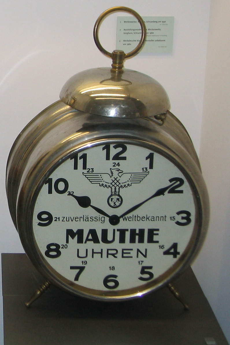 Werbewecker von Mauthe (Schwenningen, um 1930) im Deutschen Uhrenmuseum Furtwangen